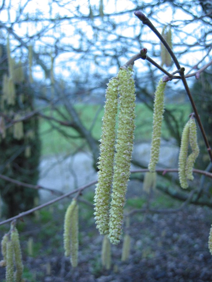 Coryllus avellana (Hazelaar)